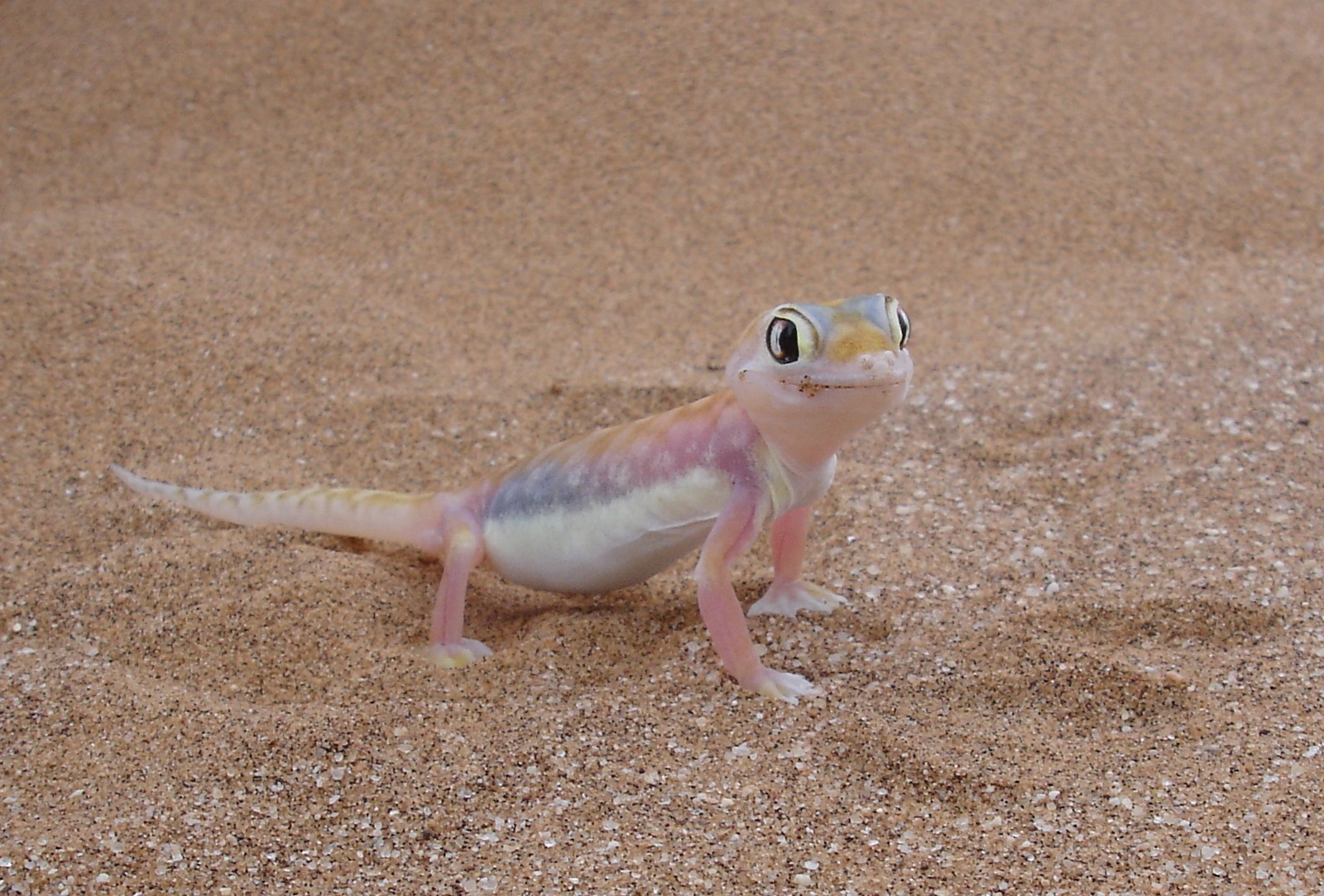 Namib-Sandgecko (Pachydactylus rangei)